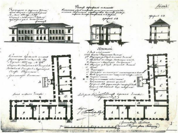 Галоўны фасад, разрэзы і планы полацкага дваранскага і прыходскага вучылішча з кватэрамі наглядчыка і настаўнікаў. Архітэктар Грэйпель. Матэрыялы разгледжаны Камісіяй праектаў і каштарысаў, а таксама "паводле журнала" Савета шляхоў злучэння і публічных будынкаў у 1835 г. Чарцёж падпісалі генерал-леётэнант Дэстрэм, Іосіф Шарлемань, архітэктар Вісконці (РДГА, ф. 1488, оп. 1. д. 425)